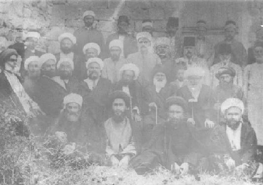 جمعية العلماء العاملية(جبل عامل) عام 1935 وتضم: الشيخ حسين مغنية - السيد محسن الأمين - الشيخ حسين نور الدين- الشيخ سليمان ظاهر- السيد عبد الحسين شرف الدين- الشيخ علي الزين- السيد محمد إبراهيم...